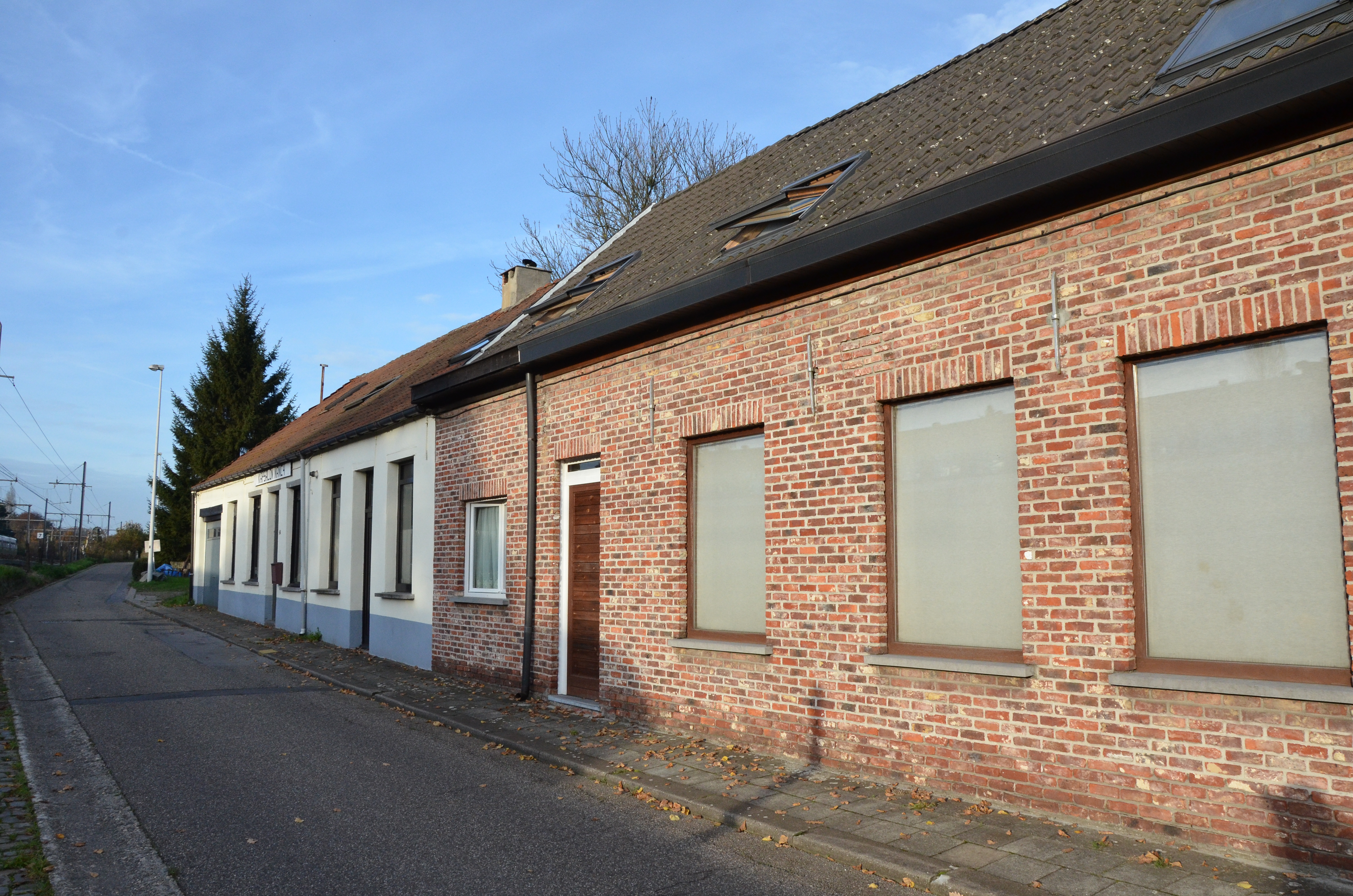 Arbeiderswoningen